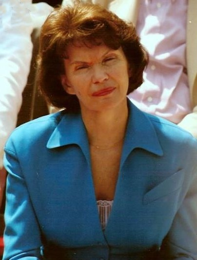 Danielle Mitterrand au festival de Cannes